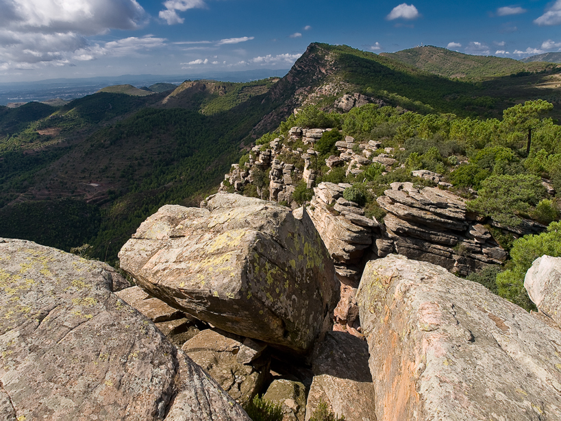 Sierra Calderona This is a photography of a Site of Community Importance in Spain with the ID: ES5232002. Natura2000 entry, EEA entry